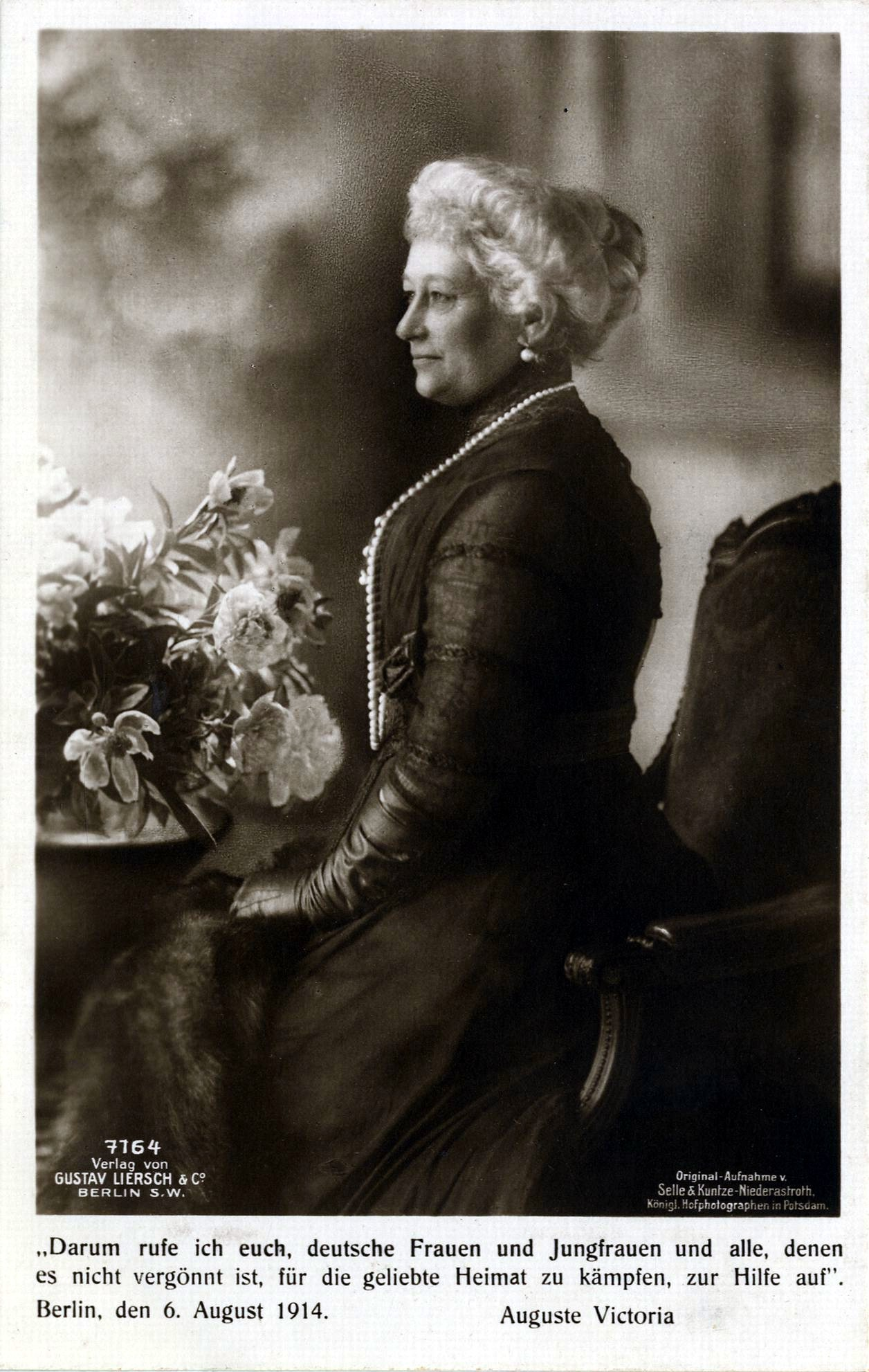 Kaiserin Augusta Viktoria: Darum rufe ich euch, deutsche Frauen und Jungfrauen und alle, denen die es nicht vergönnt ist, für die geliebte Heimat zu kämpfen, zur Hilfe auf.Berlin den 6. August 1914 - Auguste Victoria